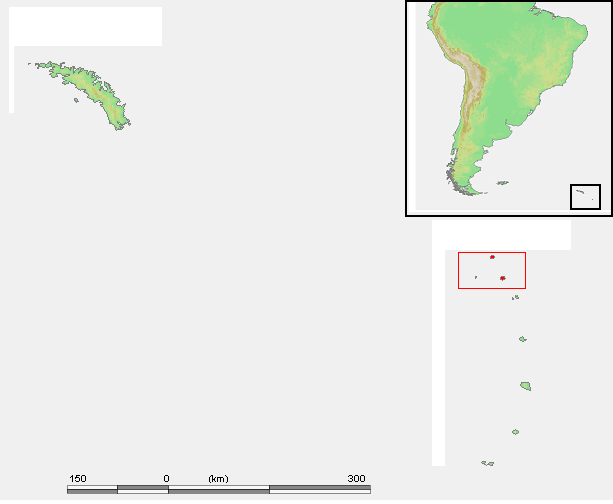 Map locating Traversay Islands (Leskov, Visokoi & Zavodovski)